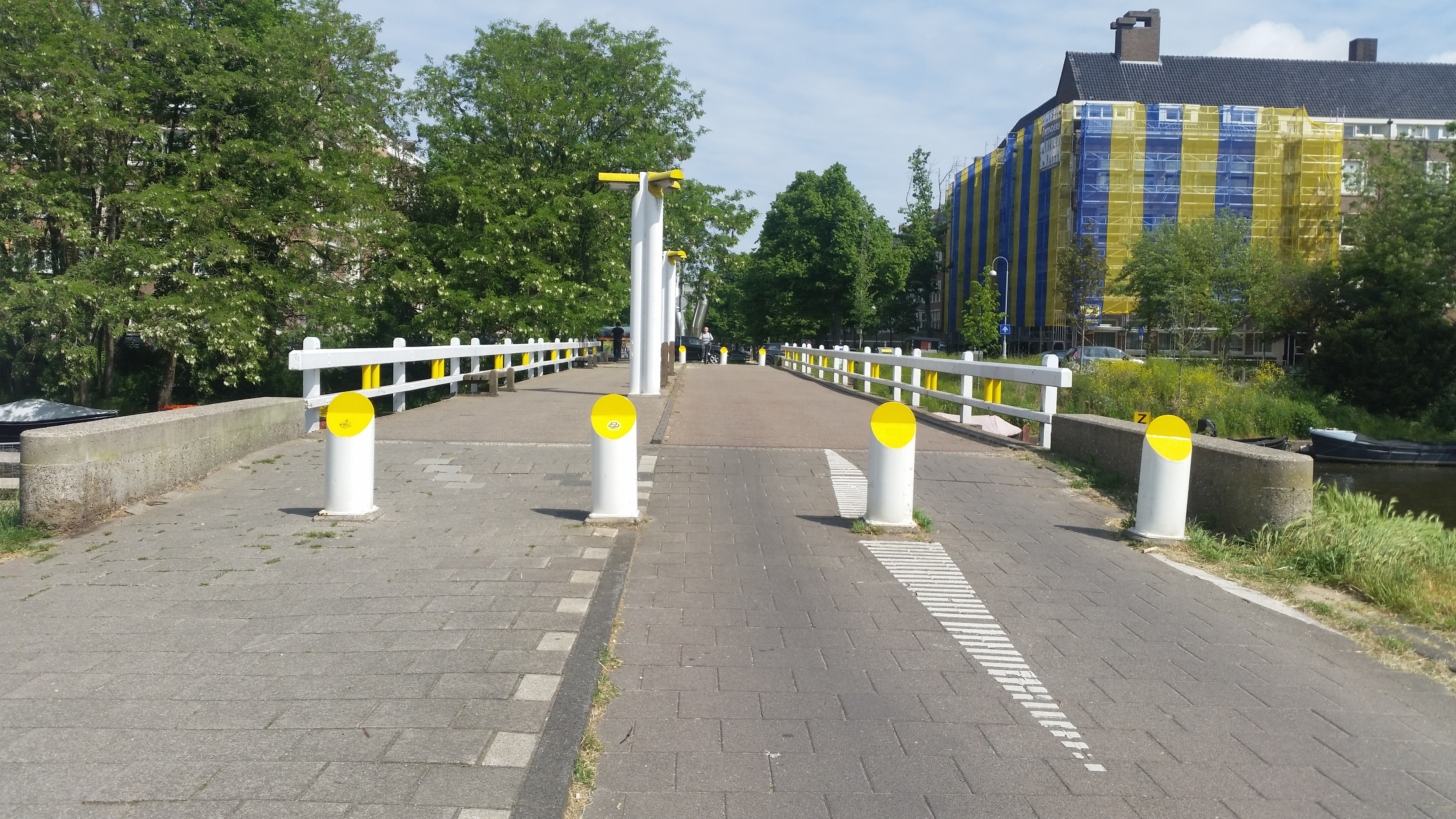 Overzicht over Brug 416 (in Amsterdam)